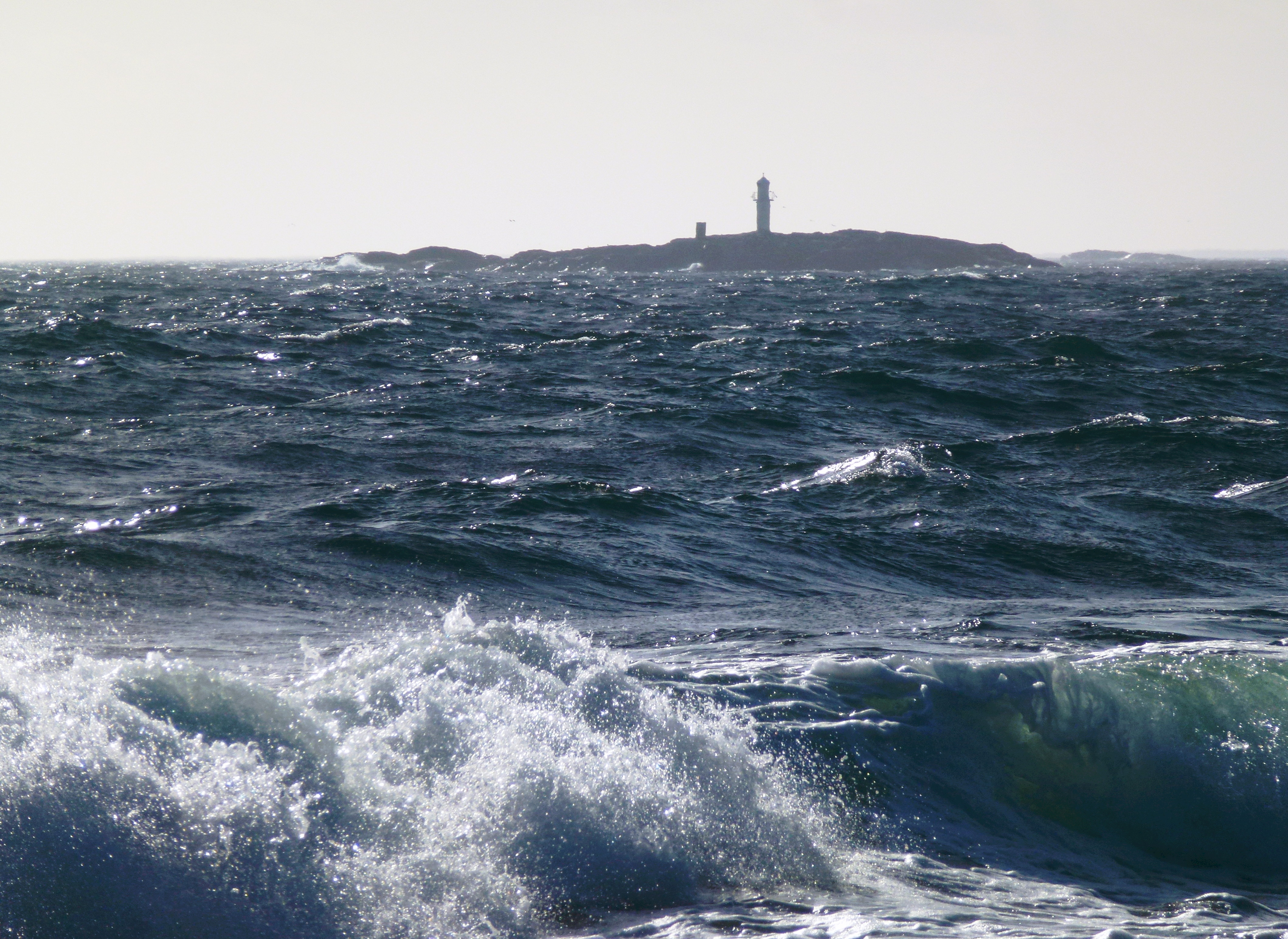 Örens naturreservat, fyren Västra Röko